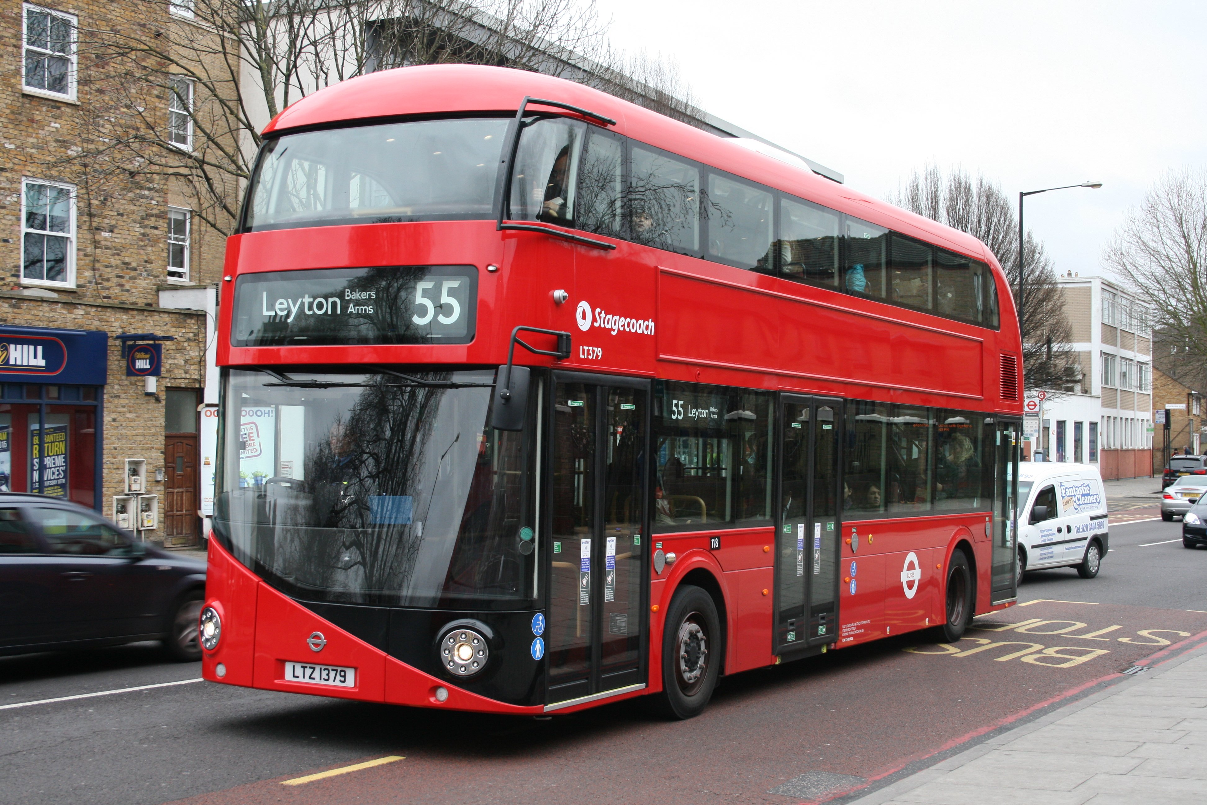 LTZ1379